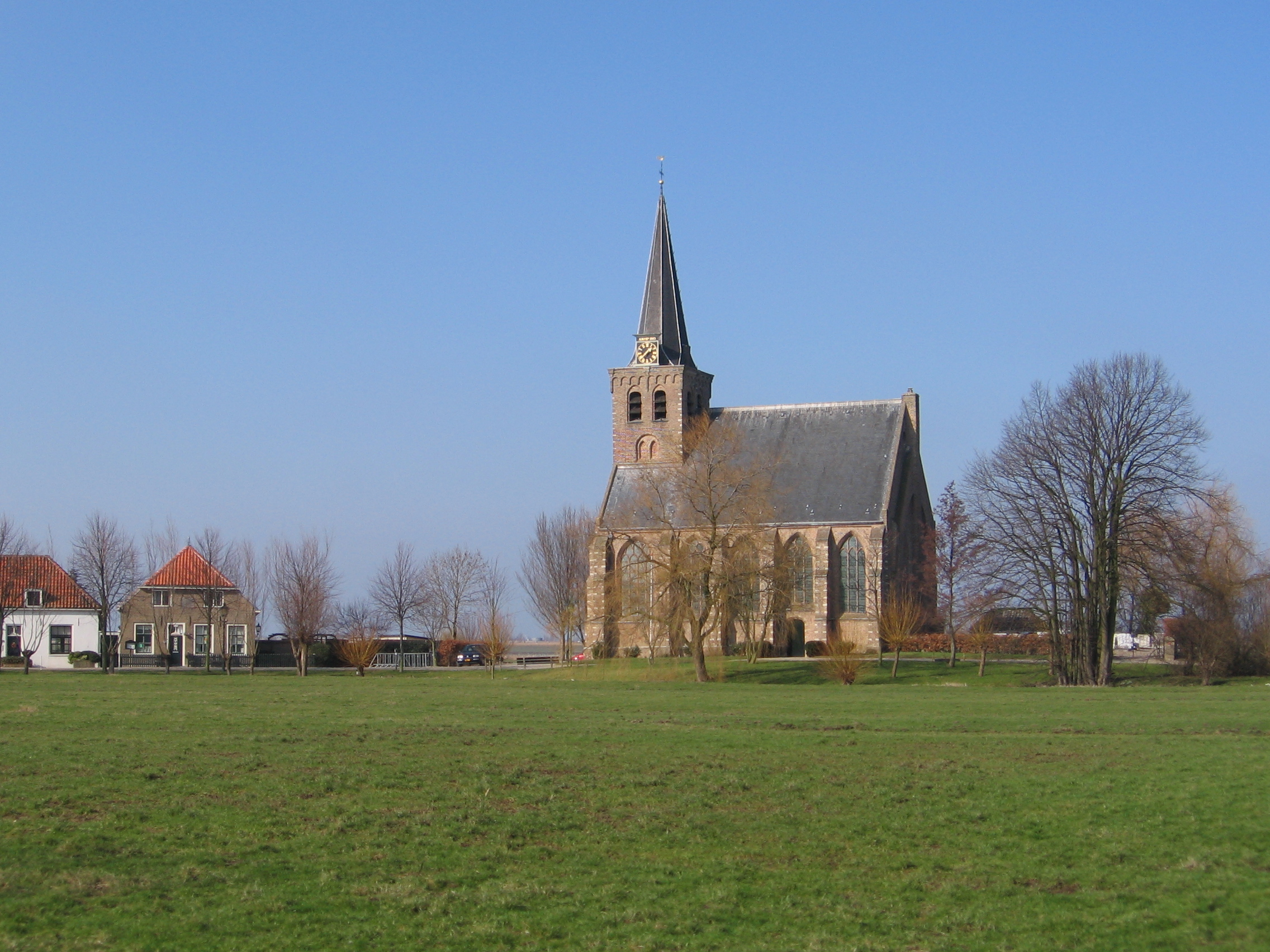 't Woudt, Zuid-Holland, 24 feb 2006